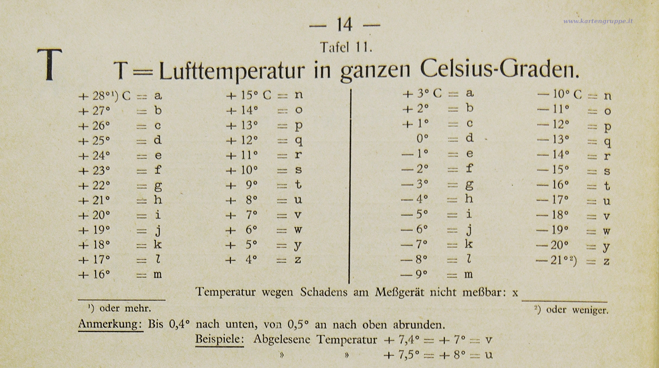 Seilte 14 Tafel 11 T=Lufttemperatur in ganzen Celsius-Graden